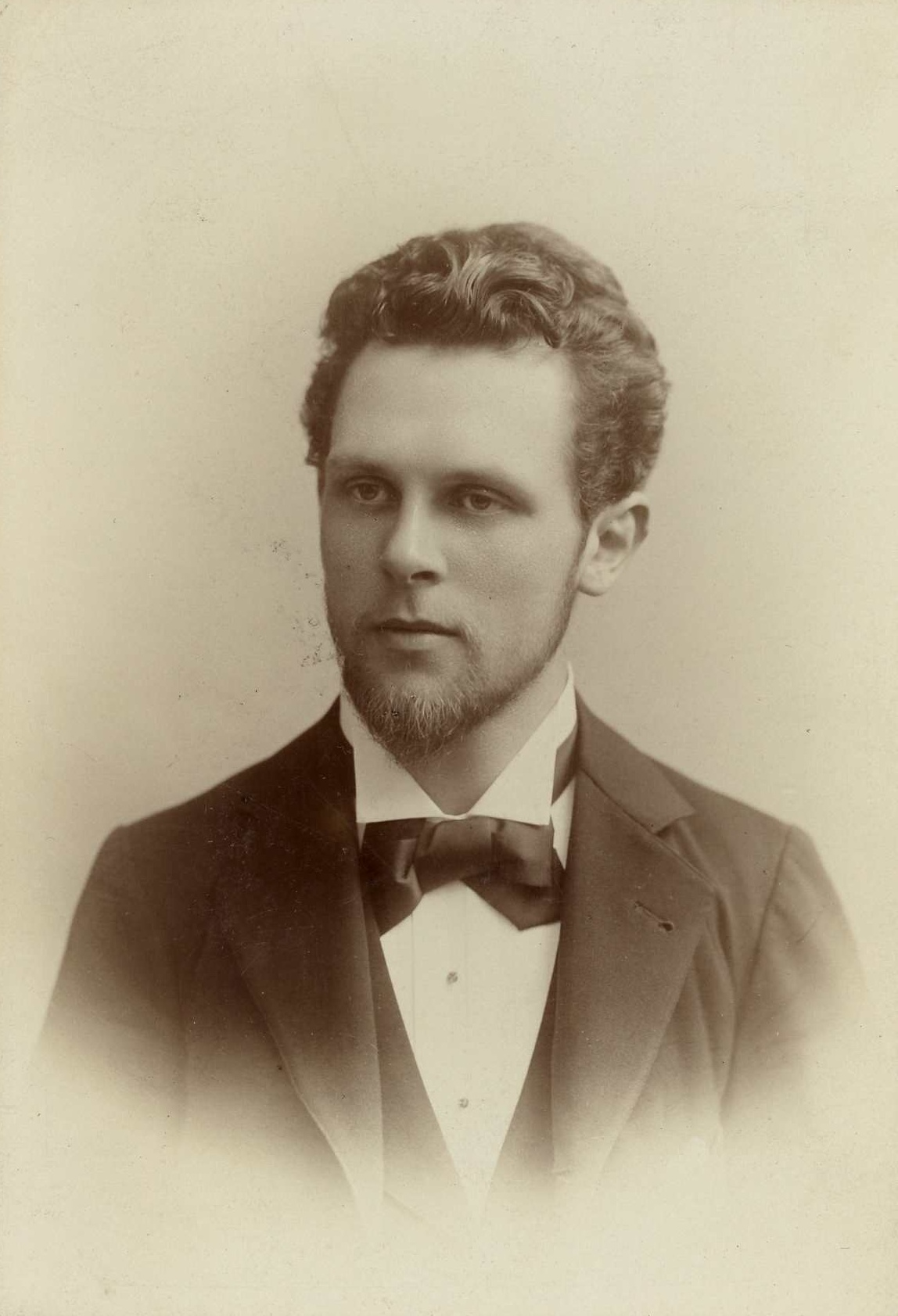 Photographie de Joseph Jongen